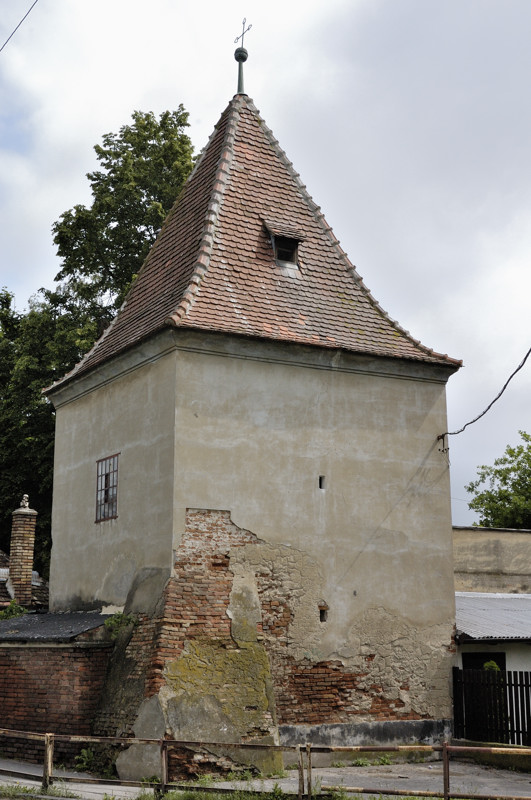 Bašta This medium shows the protected monument with the number 106-447/6 in the Slovak Republic.